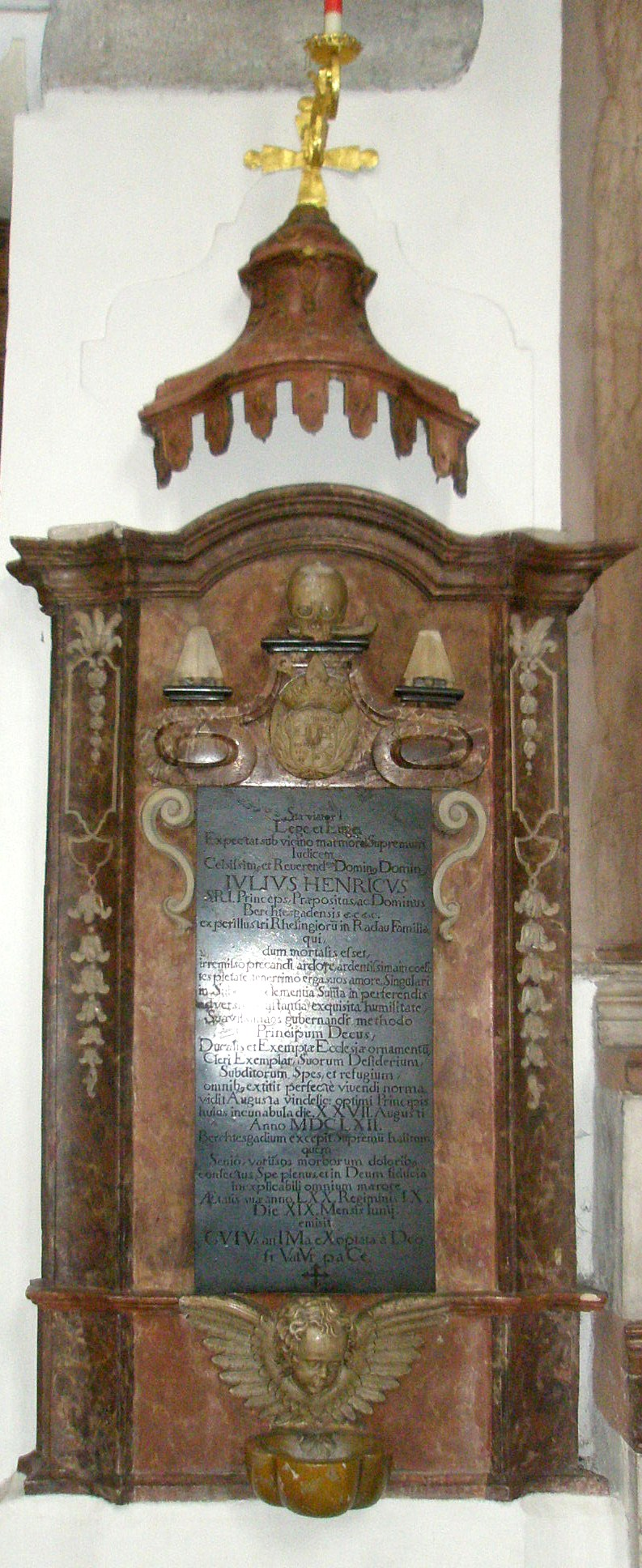 Grabdenkmal von Julius Heinrich von Rehlingen-Radau († 19. Juni 1732) in der Stiftskirche Berchtesgaden